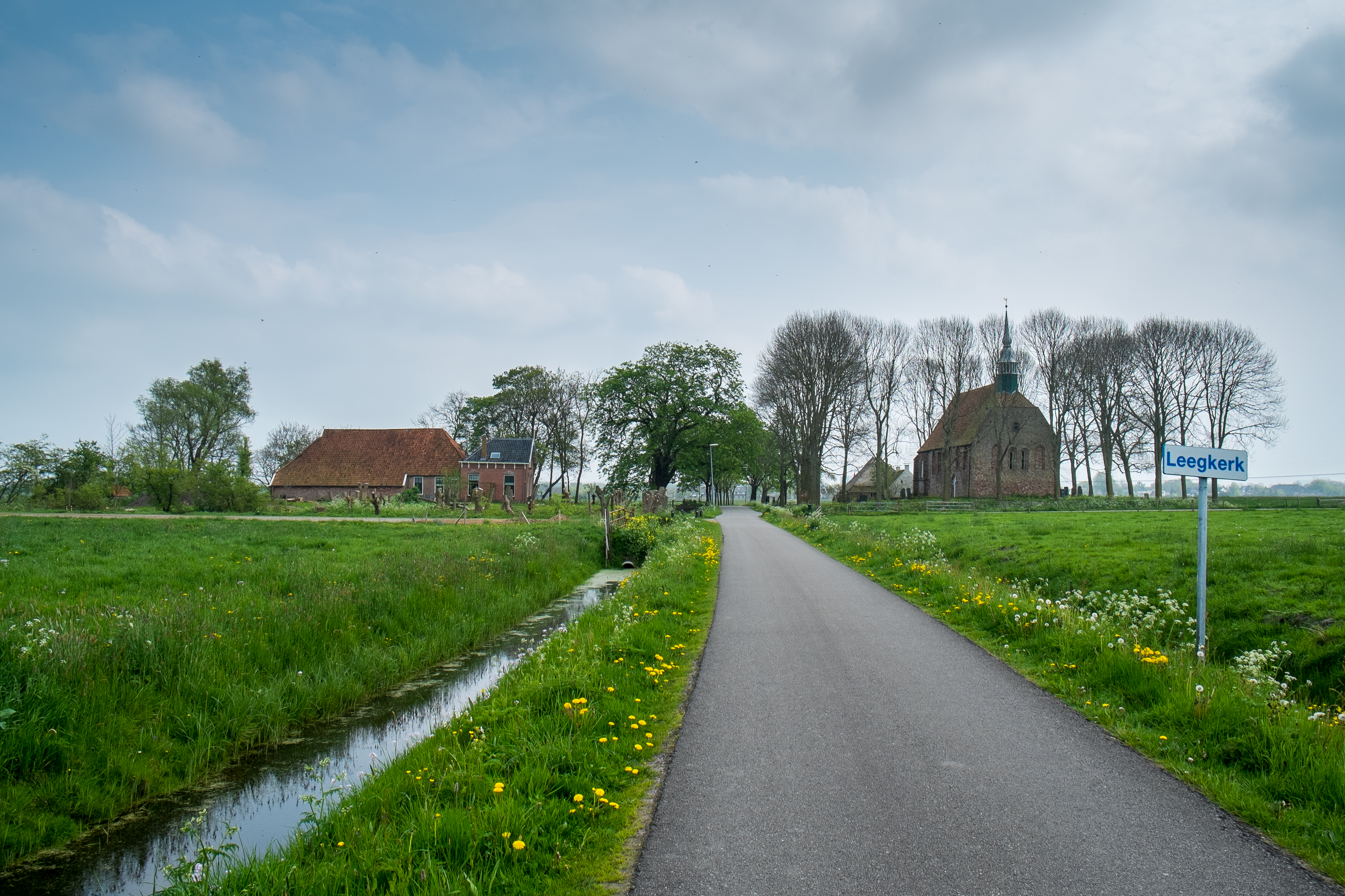 Gezicht op de kern van Leegkerk